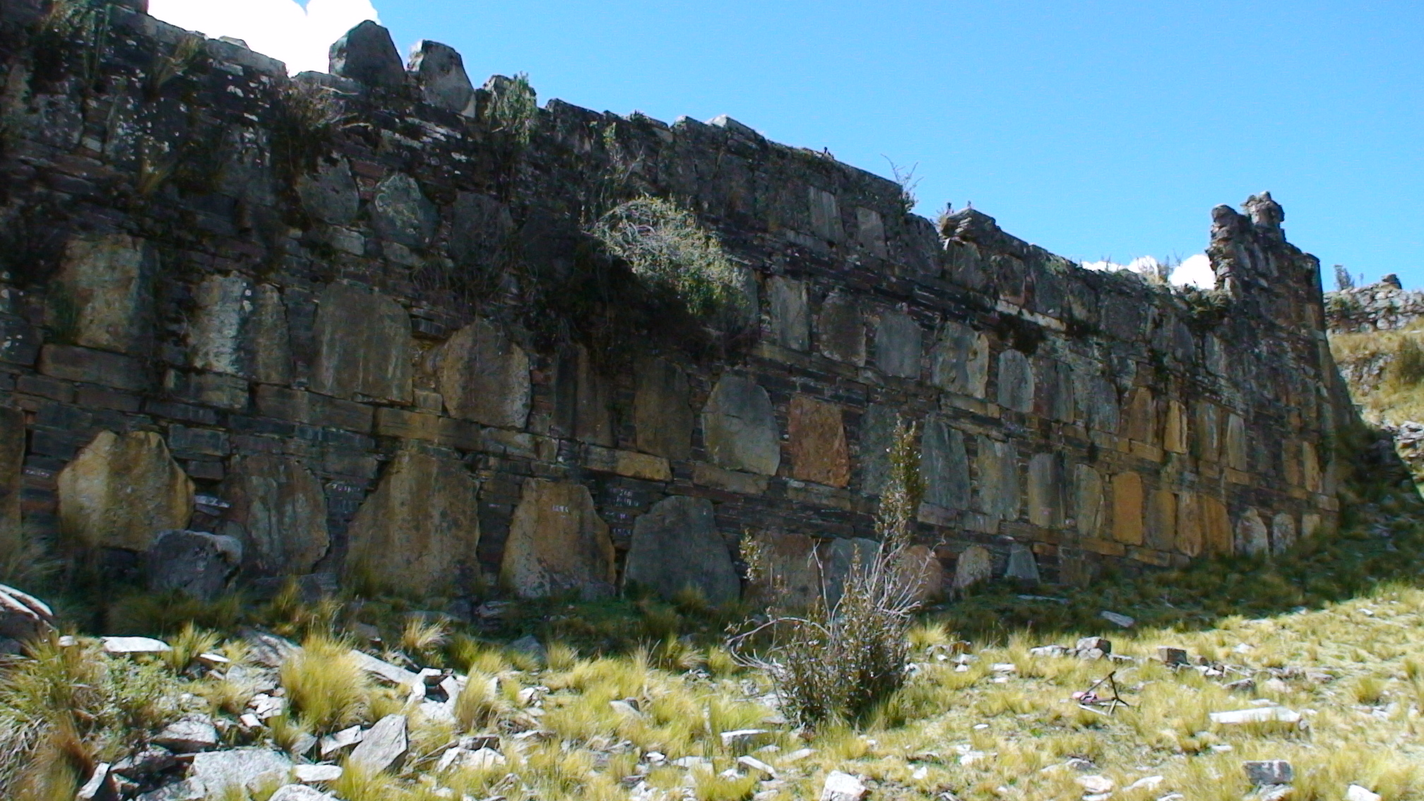 recinto mayor